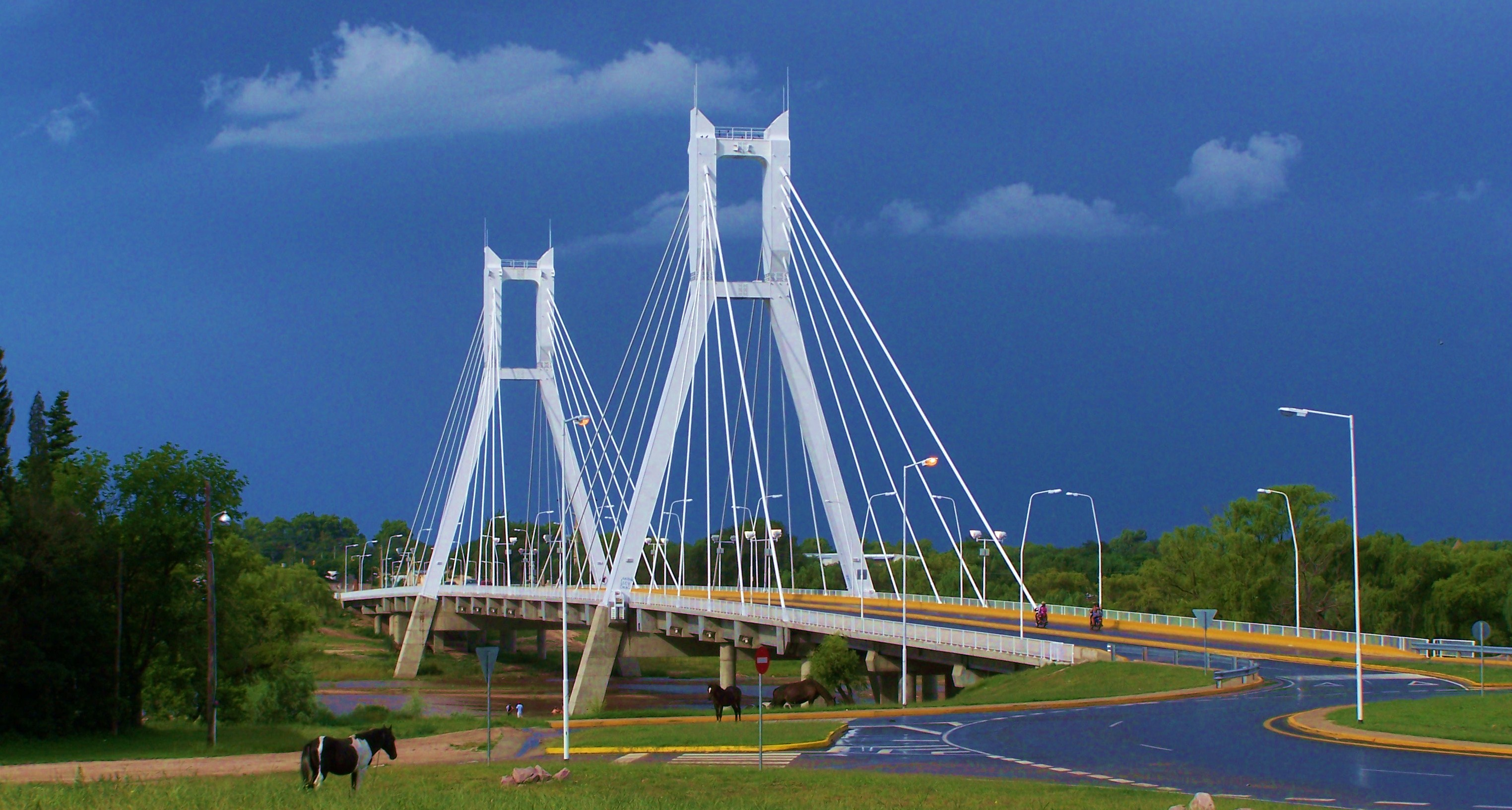 Puente colgante sobre el Río Cuarto en Río Cuarto, Córdoba, Argentina.